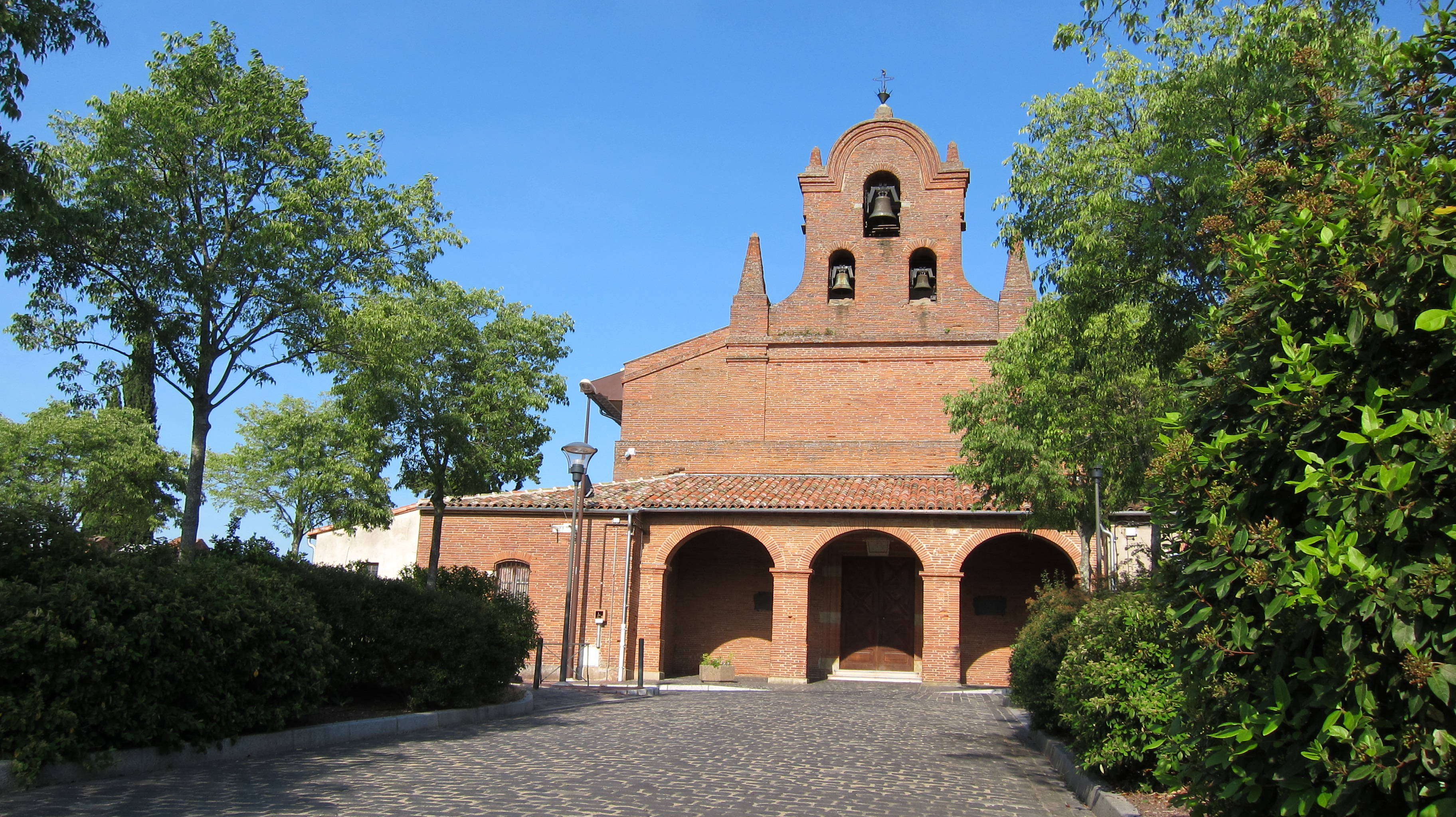 Toulouse (Haute-Garonne, Midi-Pyrénées, France) : Église de Lalande.